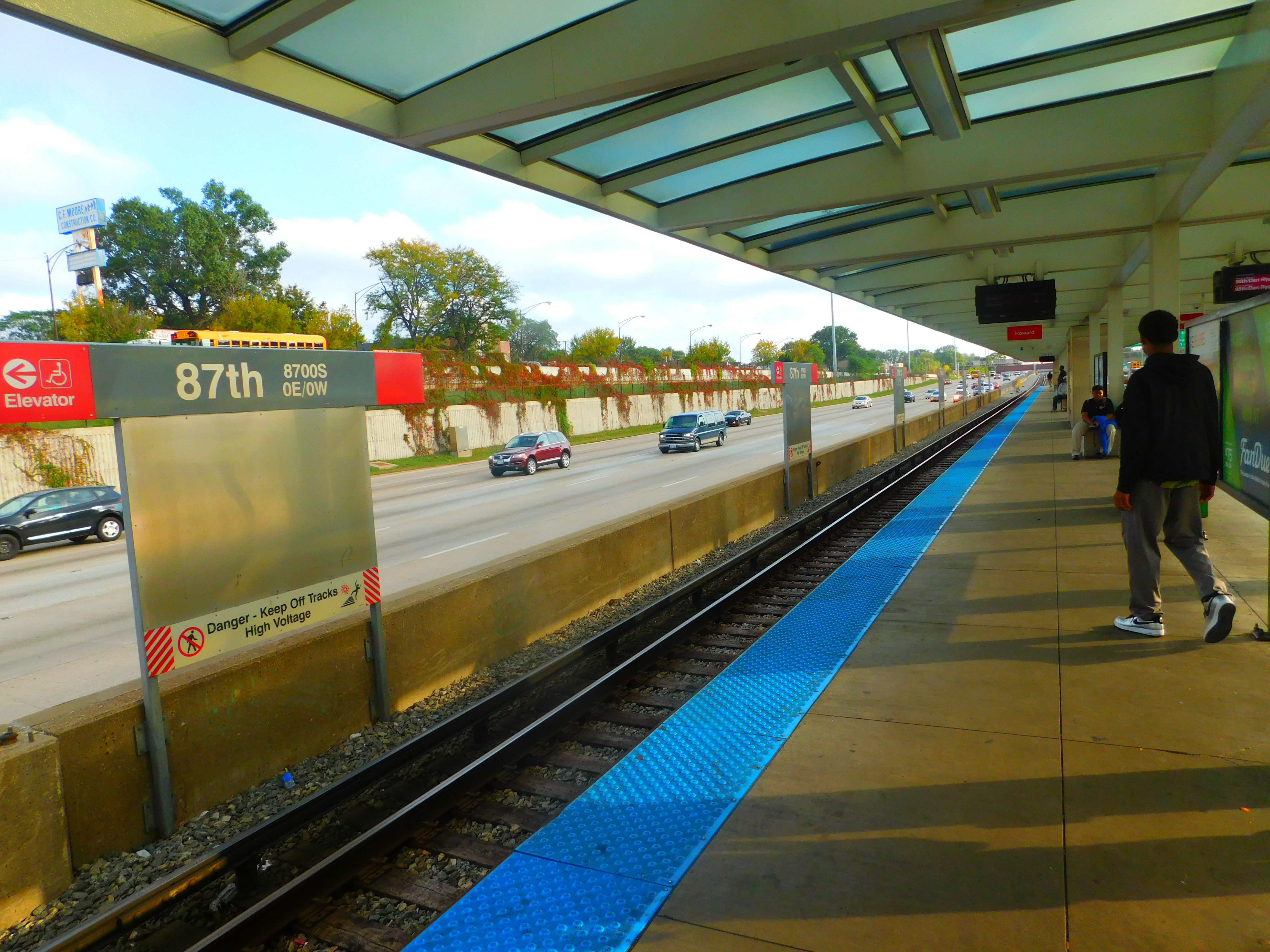 Chicago, Illinois